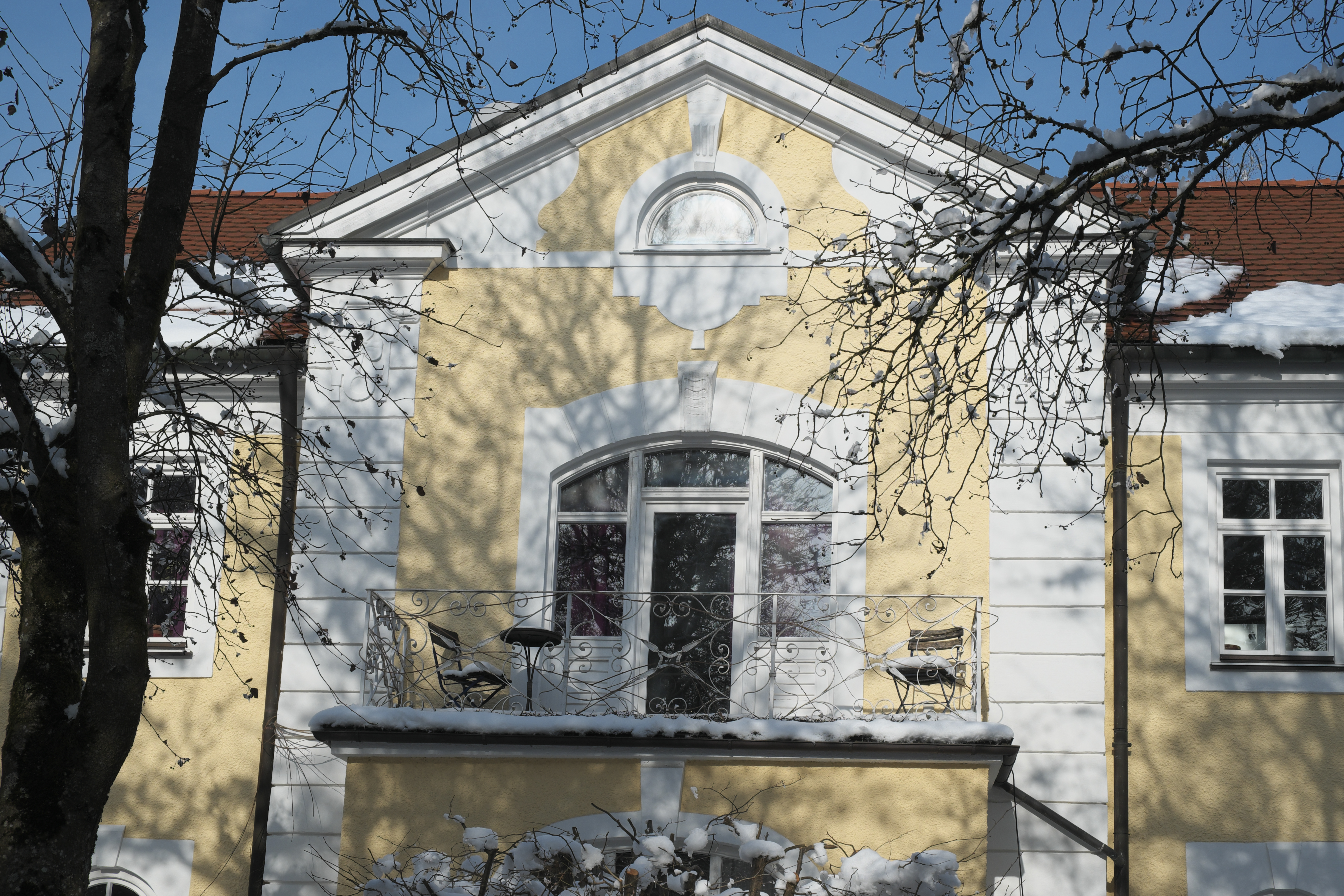 Landhaus, Rubensstraße 6, in Obermenzing im Stadtbezirk Pasing-Obermenzing in München (Bayern/Deutschland), um 1897 erbaut, aus dem Büro August Exter